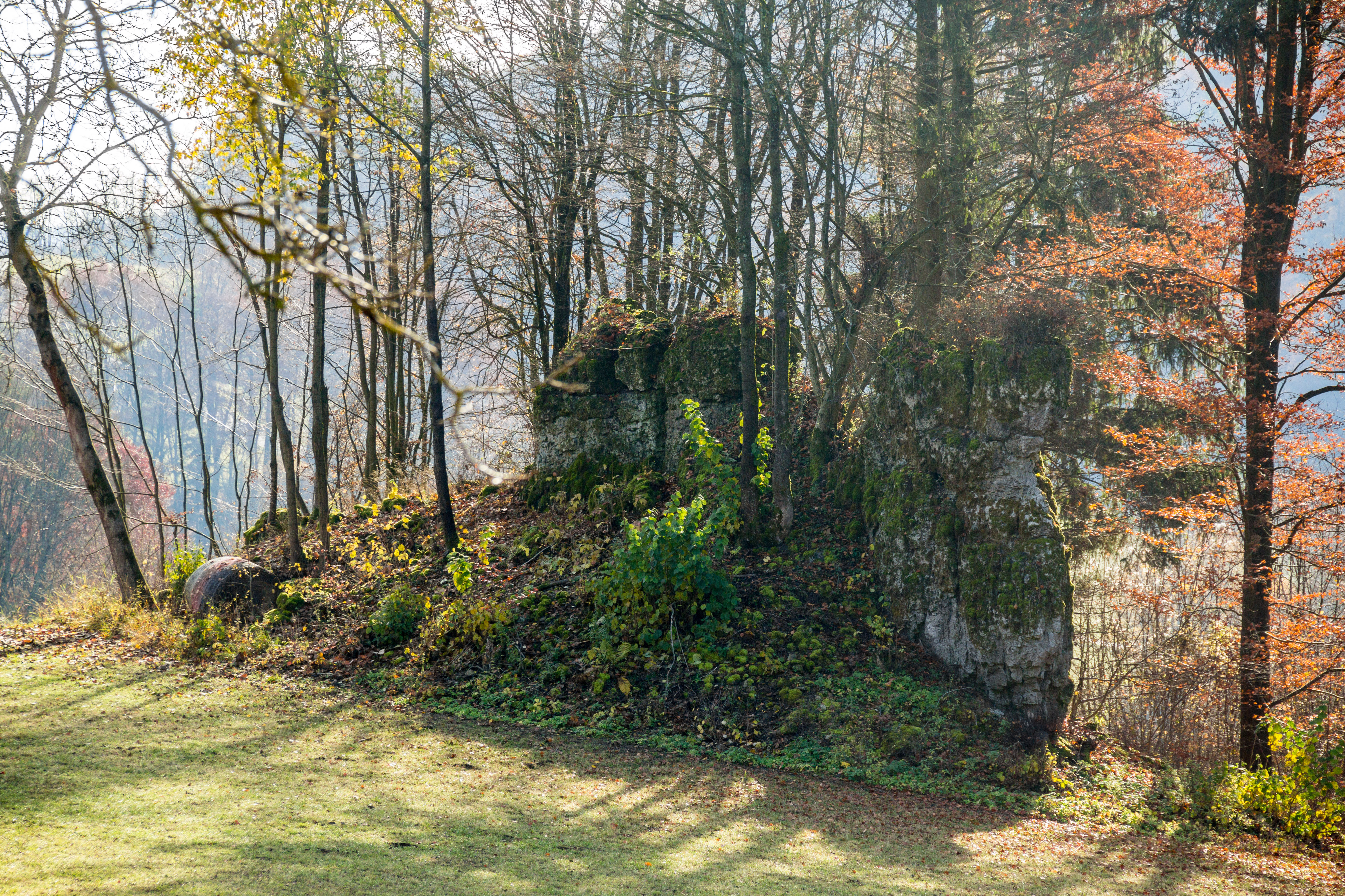 Felsen, Affalterthal, Geotop